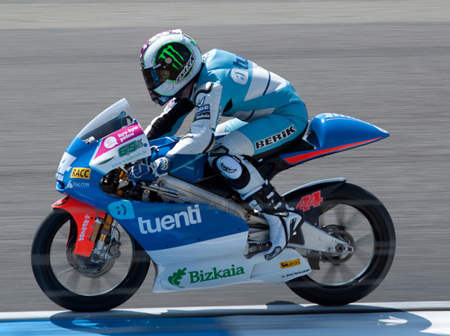 pol espargaro